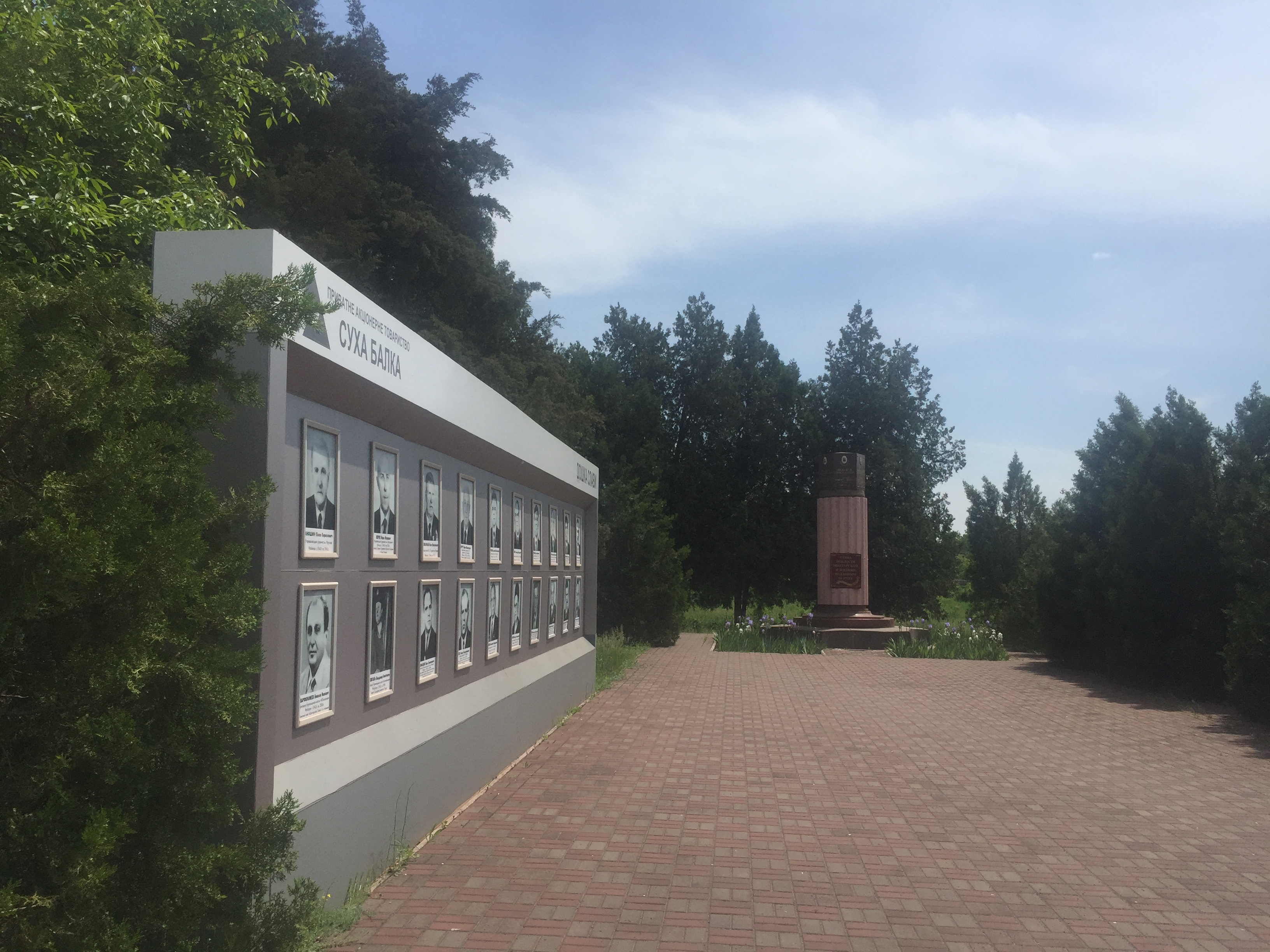 Памятник погибшим шахтерам